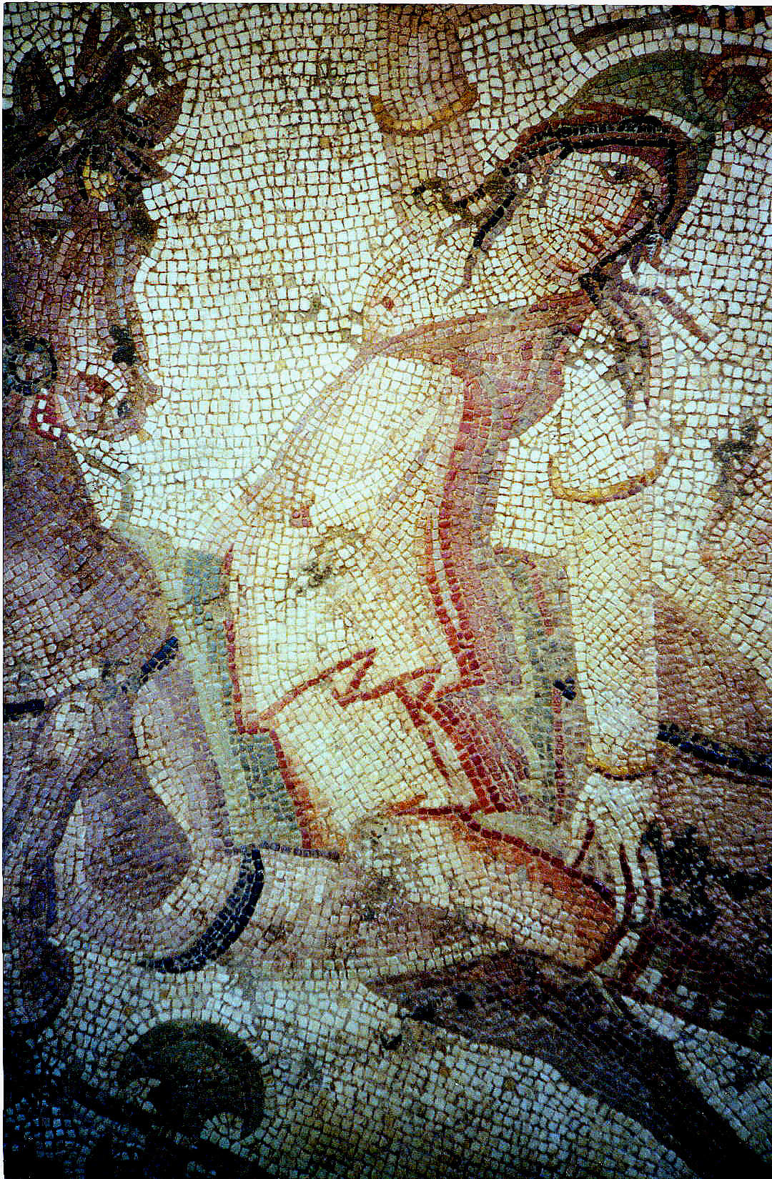 Amazonomachie, détail, 2ème moitié du IV° s. ap. J.-C., Turquie, Daphné (faubourg d'Antioche sur l'Oronte, actuelle Antakya), fragment de mosaïque de pavement, marbre et calcaire.